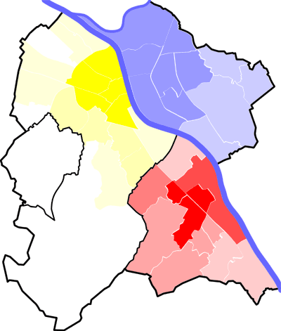 de Eingemeindungen von Bonn: Gelb = Bonn (seit 1904) Rot = Bad Godesberg (seit 1899) Blau = Beuel (seit 1952) Je heller die Farbe, desto später erfolgte die Eingemeindung. Weiße Gebiete und die Gebiete von Bad Godesberg und Beuel gehören seit 1969 zu Bonn.